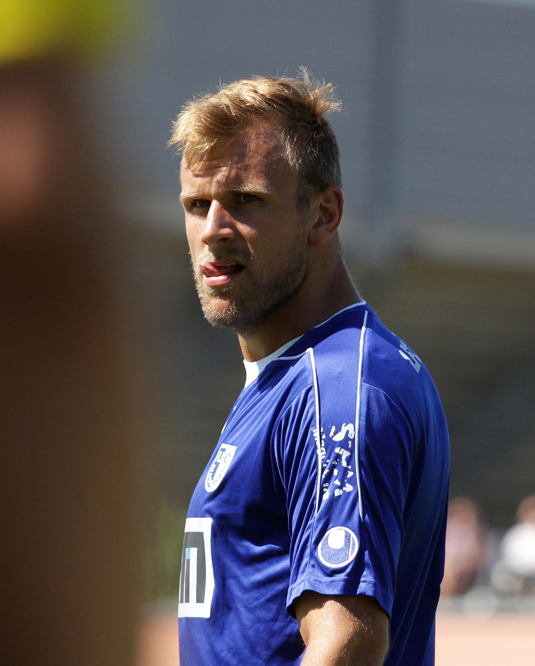 Felix Schiller